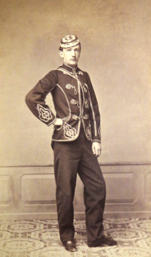 Karl Speth von Schülzburg, Foto von F. Brandseph, Stuttgart, auf der Rückseite ist der Dargestellte benannt, datiert 1864, mit Zirkel der Suevia Stuttgart oder Tübingen und Corps Guestphalia Heidelberg.